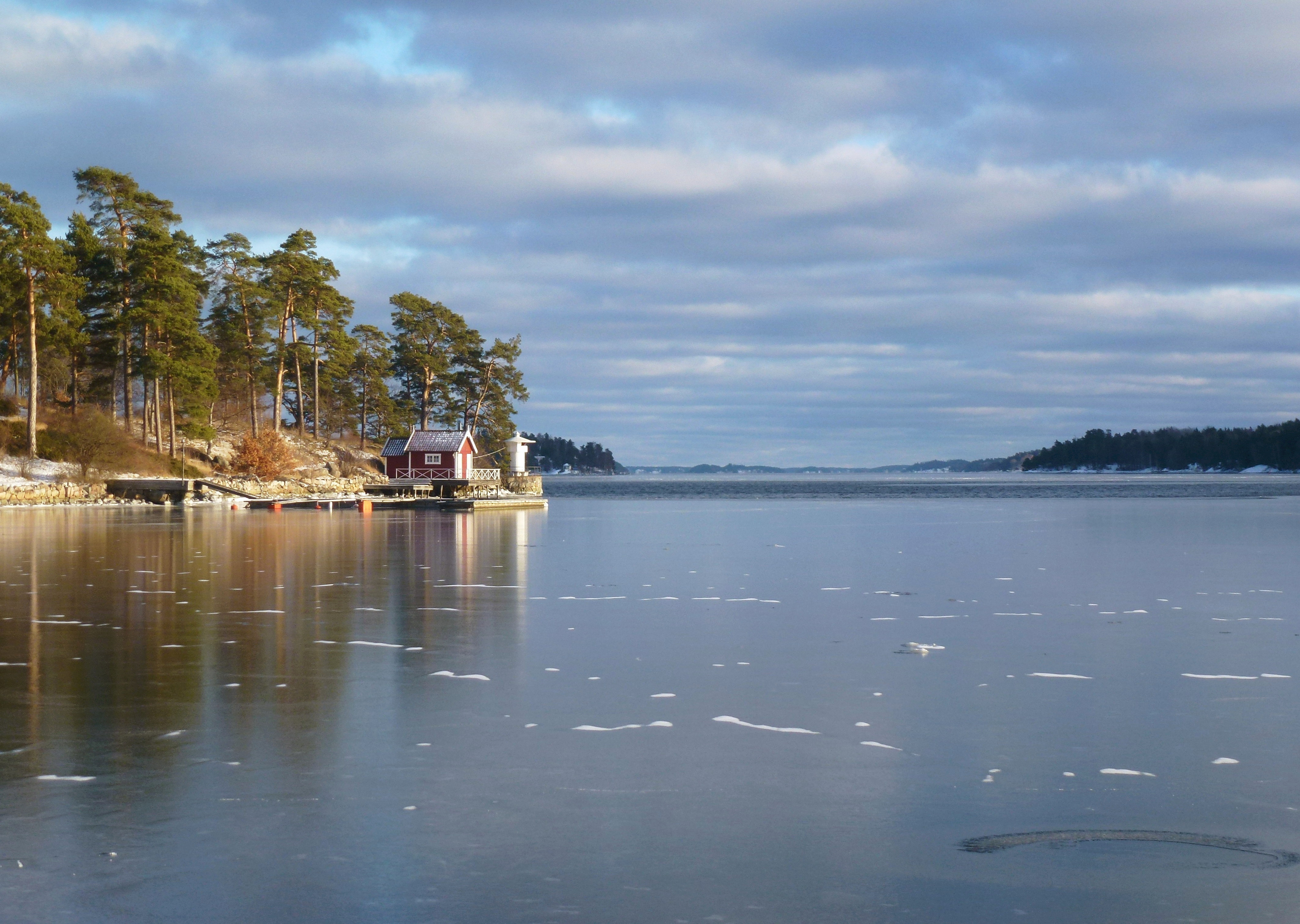 Stora Värtan mot norr från Aluddens fyr